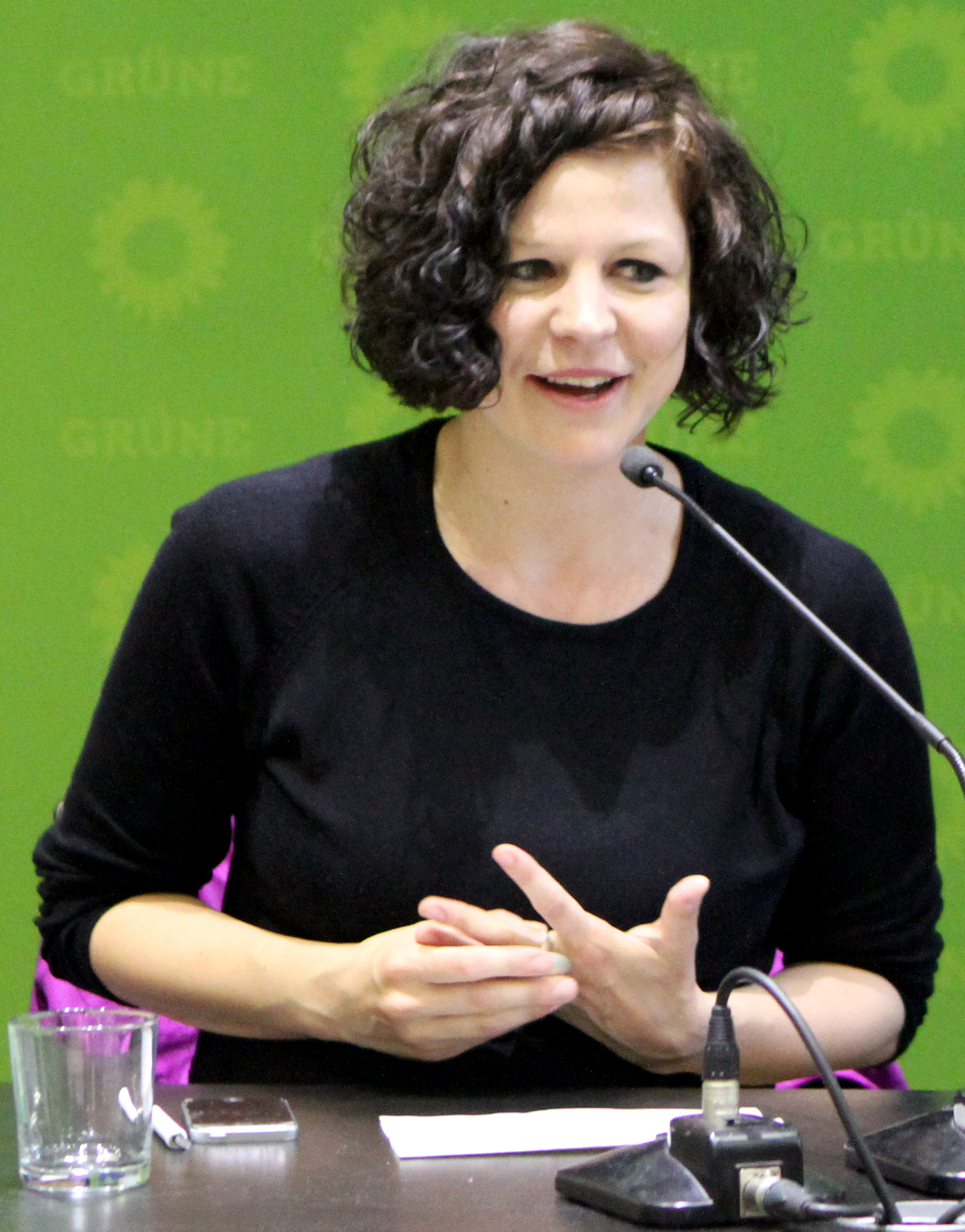 Gesine Agena and Katrin Rönicke